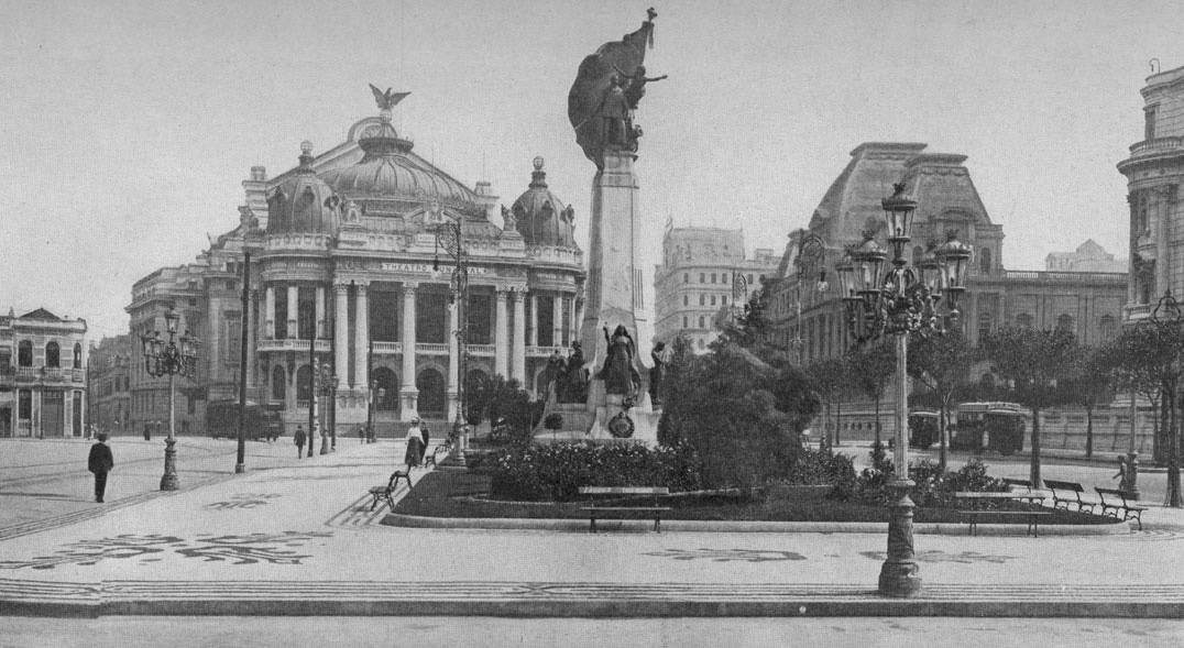 Cinelandia square in Rio de Janeiro (1919 photo), Brazil